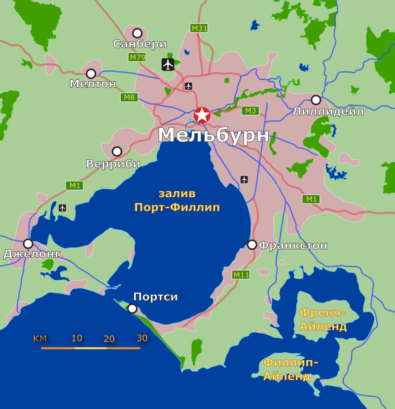 Схема Большого Мельбурна